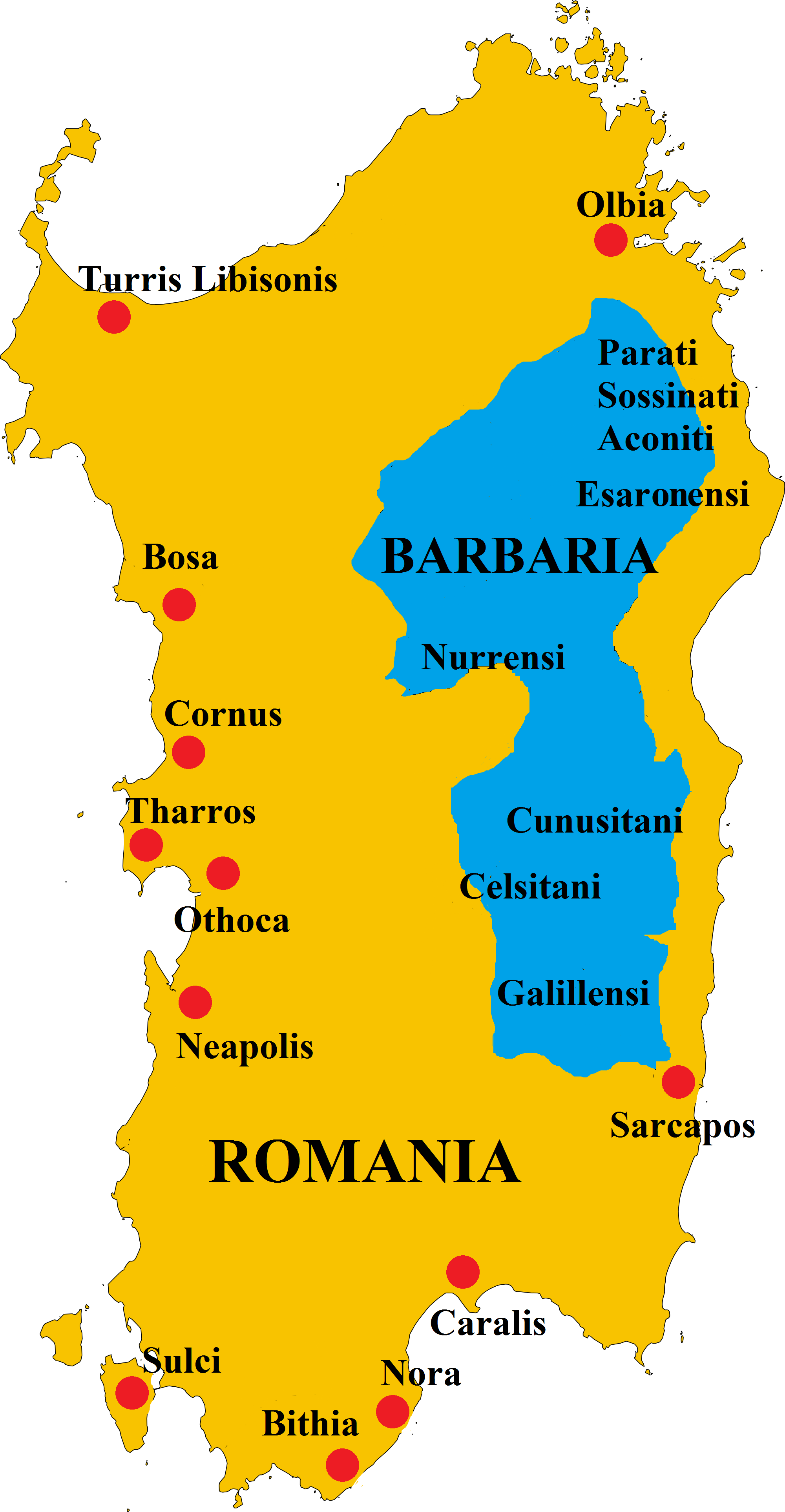 Situazione politica in Sardegna durante il periodo romano